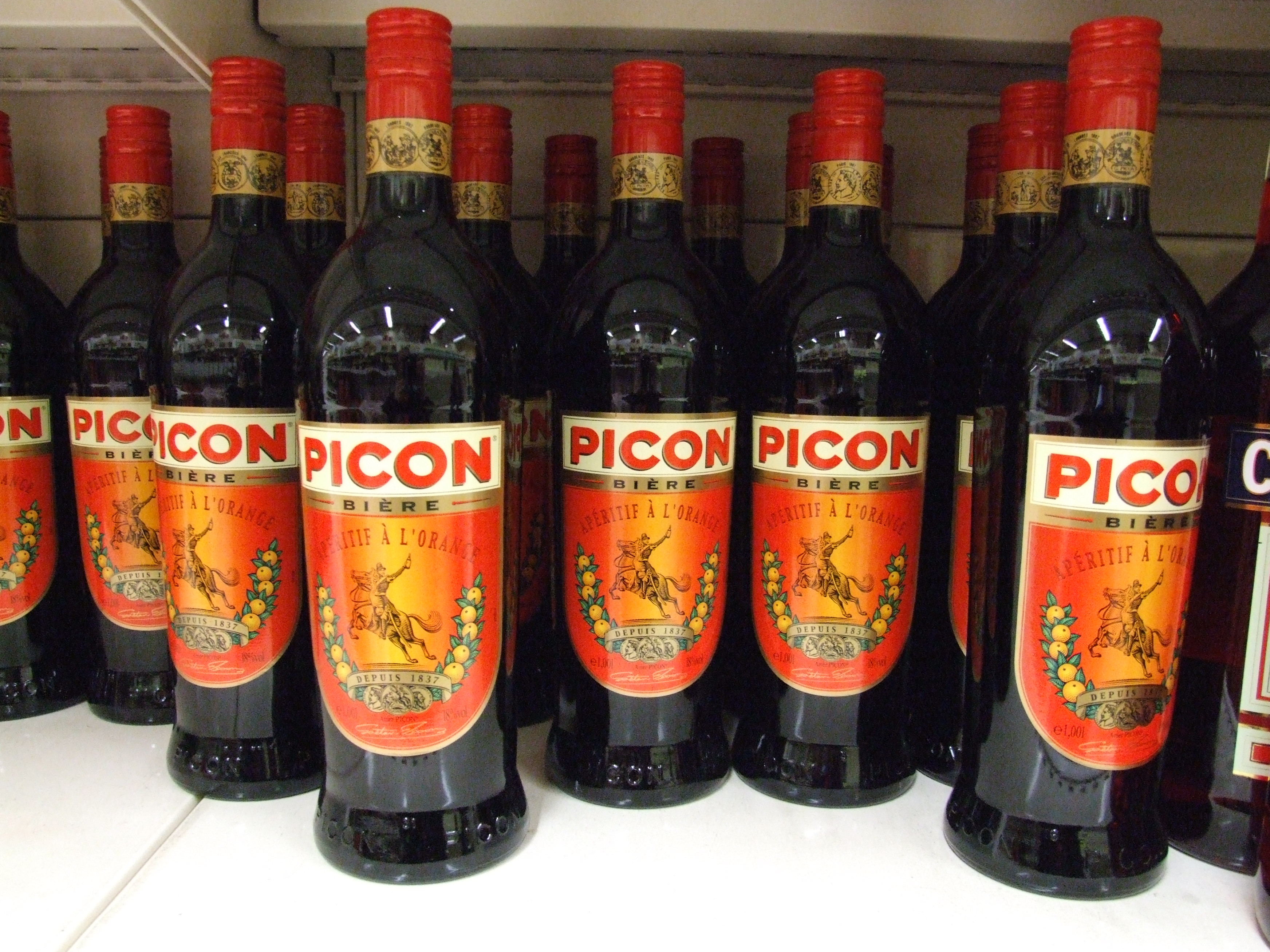 Picon